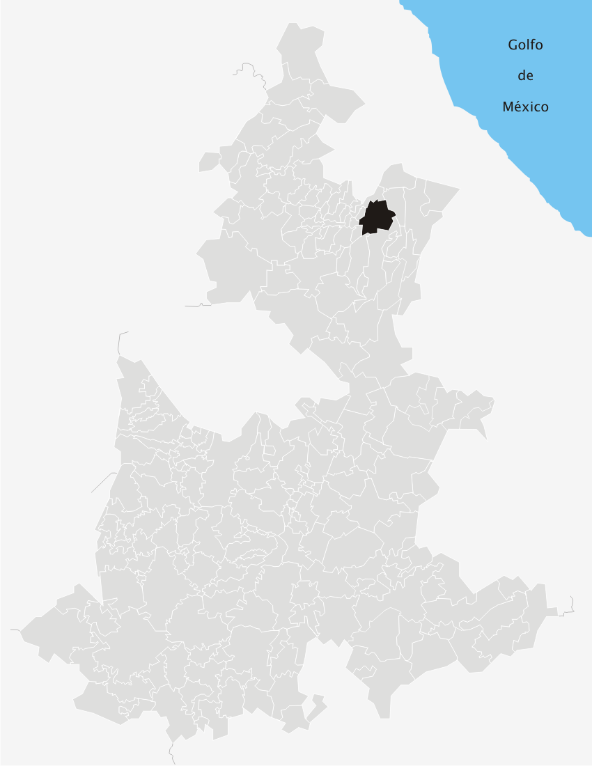 Localización del municipio de Cuetzalan del Progreso en el estado de Puebla (México)